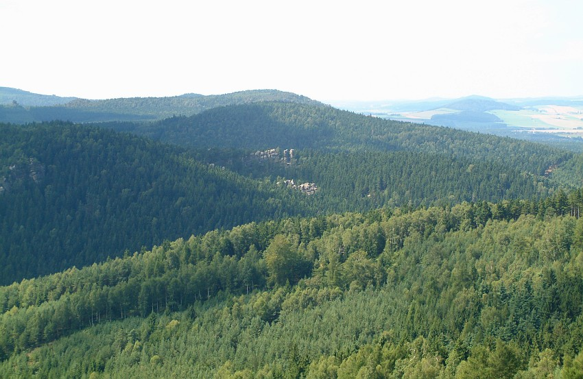 Weißbachtal und Uhusteine from Popova Skala, Lusatian Mountains, Czech Republic